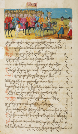 როსტომიანი (S-1580)